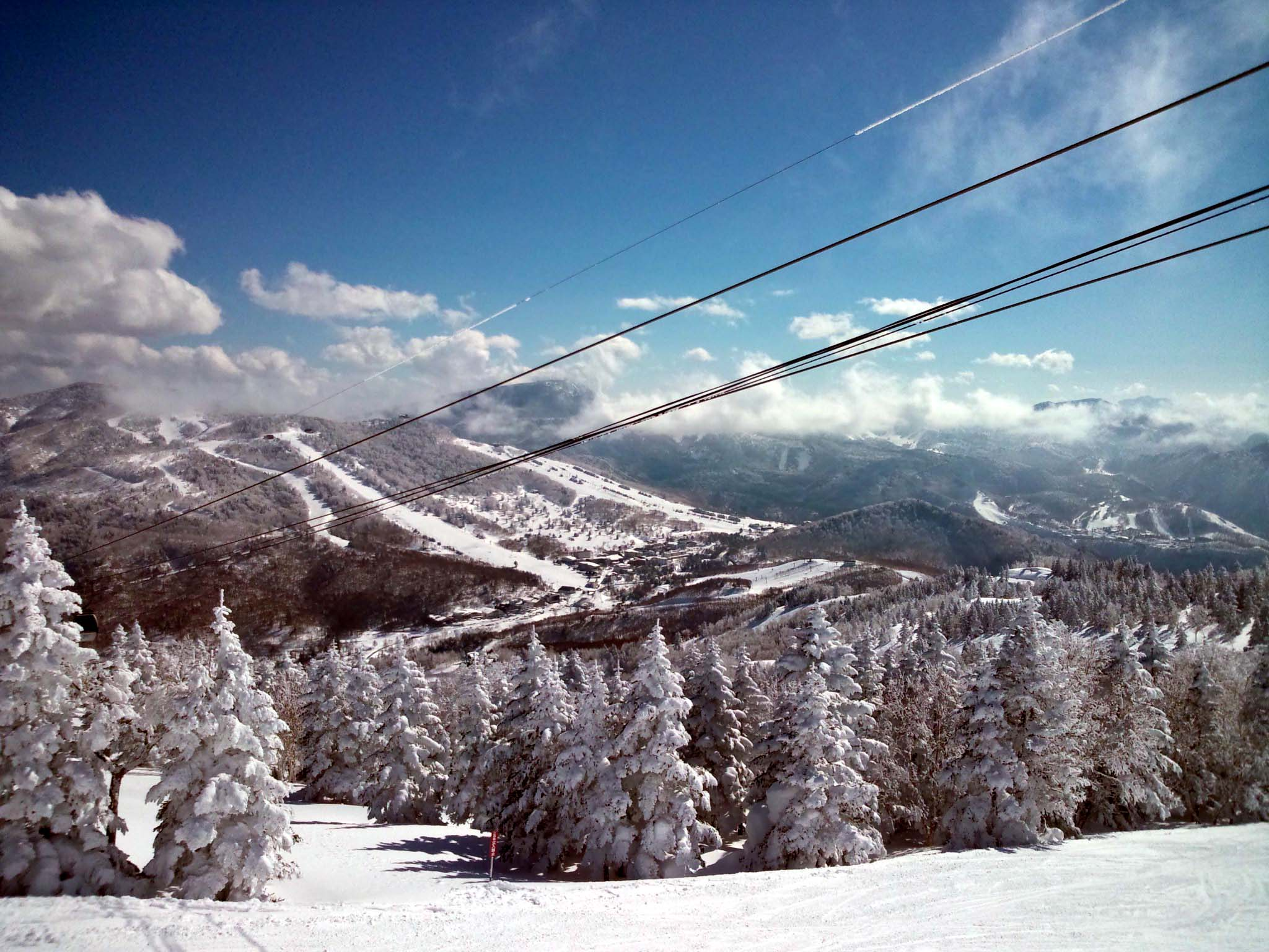 志賀高原一ノ瀬スキー場 焼額山から撮影